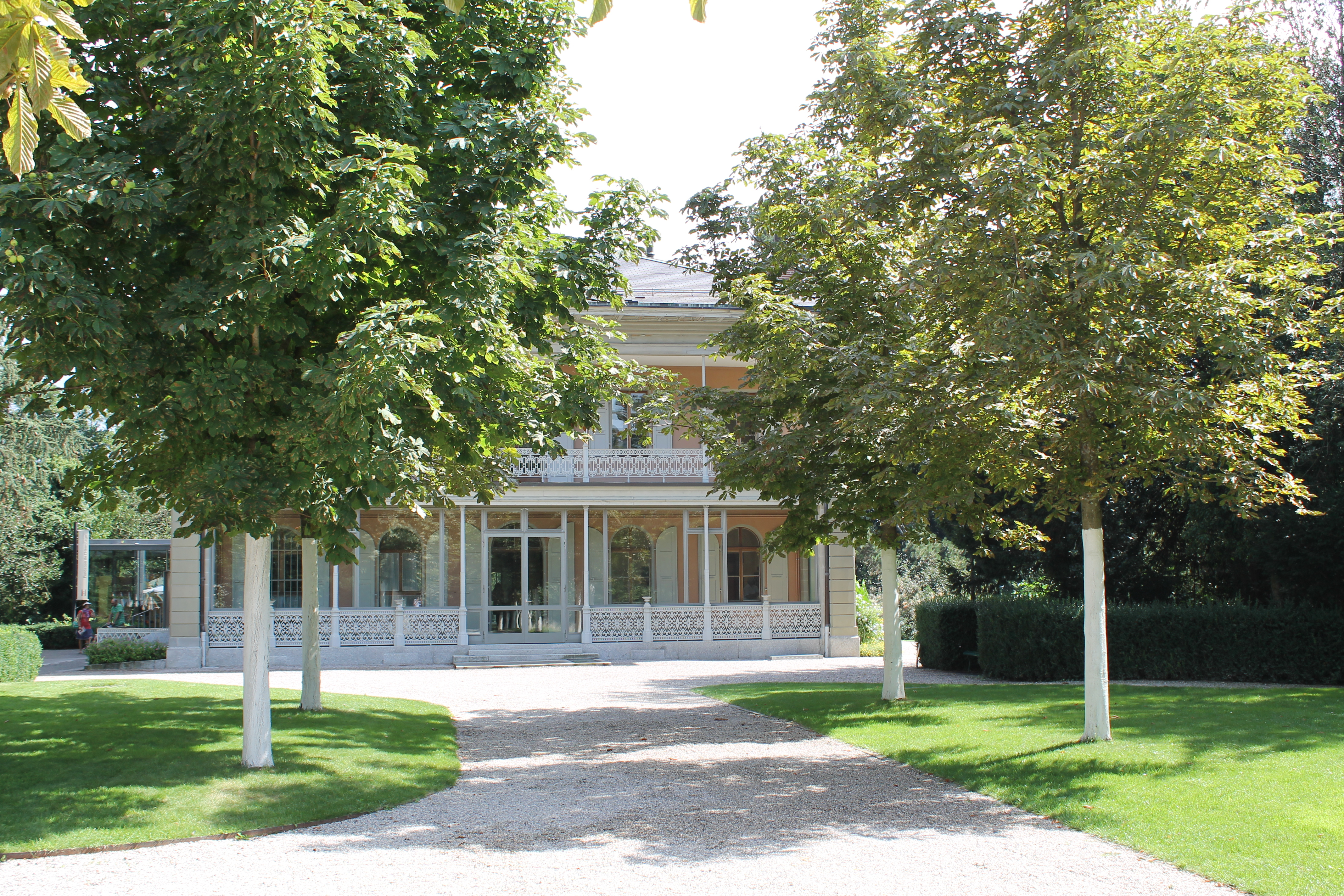 Lausanne